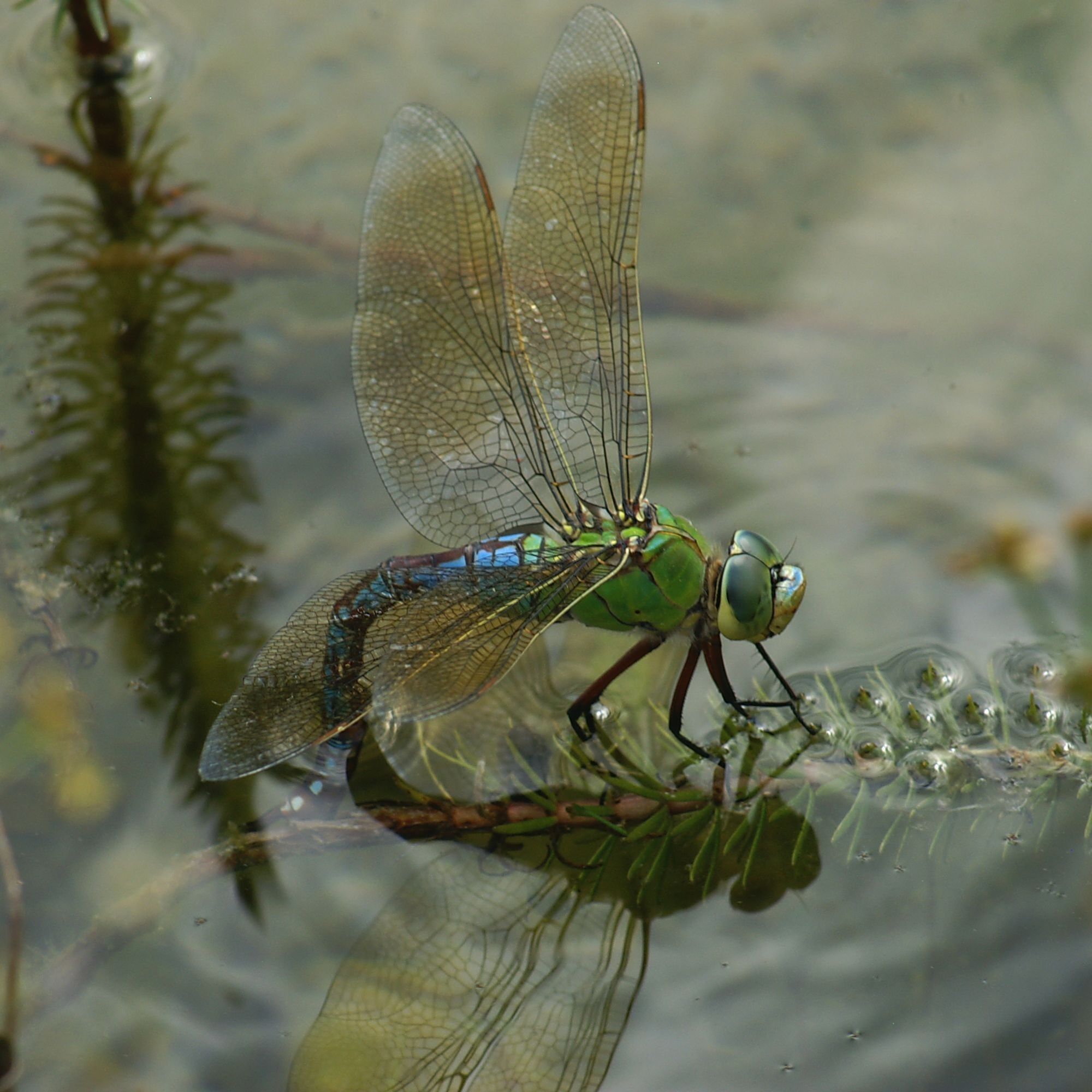 Große Königslibelle bei der Eiablage.